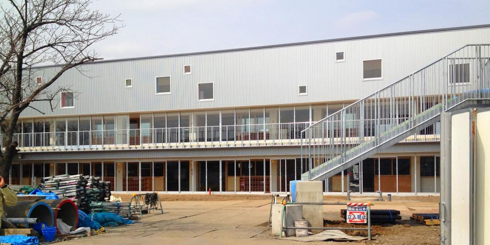 加藤学園幼稚園新園舎工事現場を2012年3月16日に現場際から撮影したもの。なお工事関係者の許可を得て撮影。